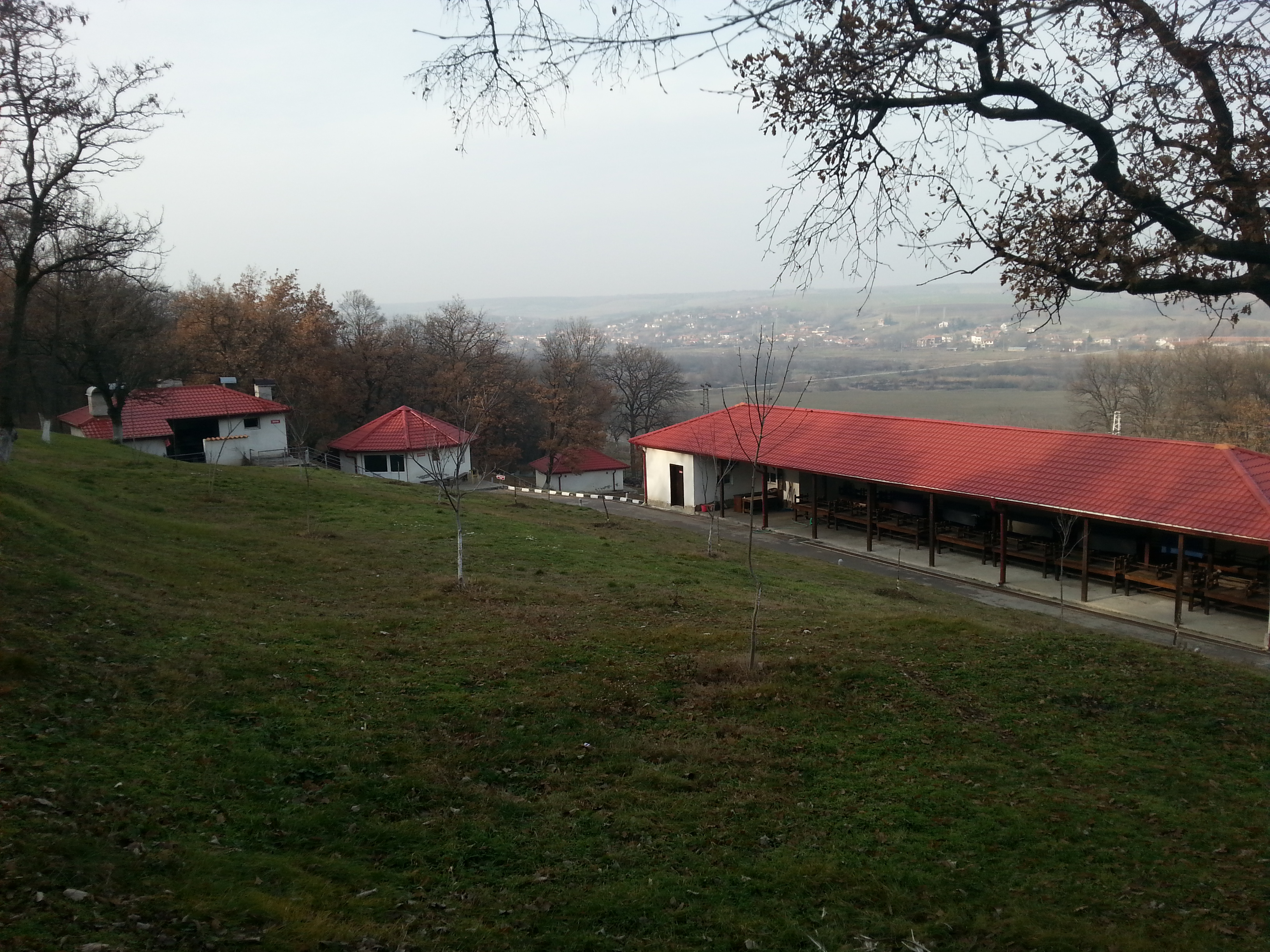 Село Текето. Мястото за курбан